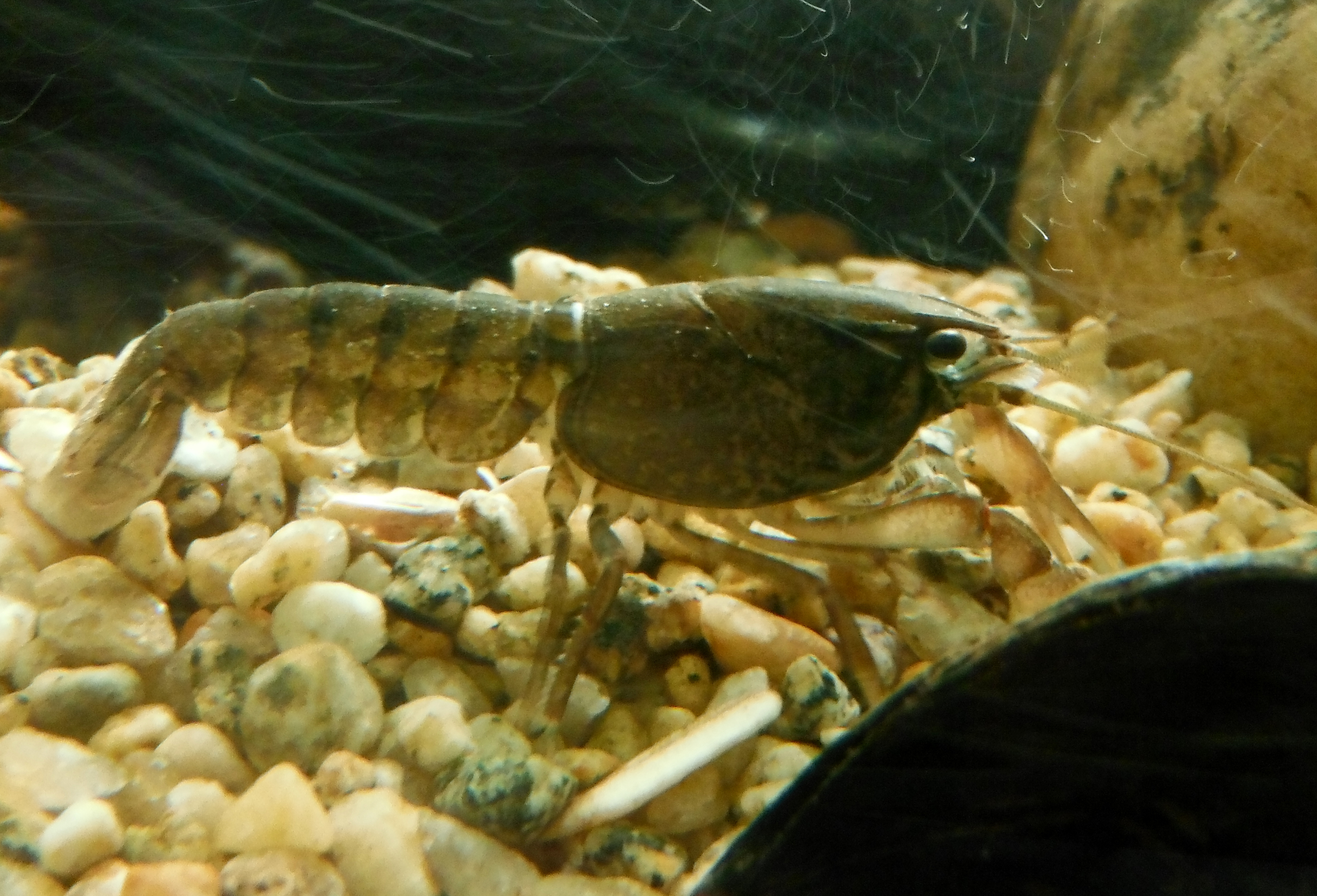 Camarón de río del sur, proveniente del río Santo Domingo, Valdivia - Chile.